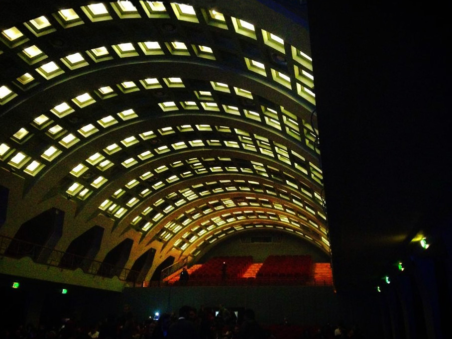 Teatro del palazzo di Città di Salerno